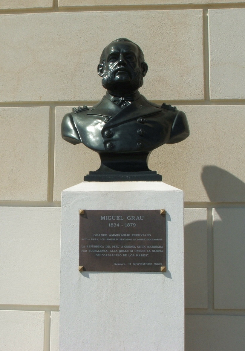 Immagine da Genova - Corso Italia - Boccadasse